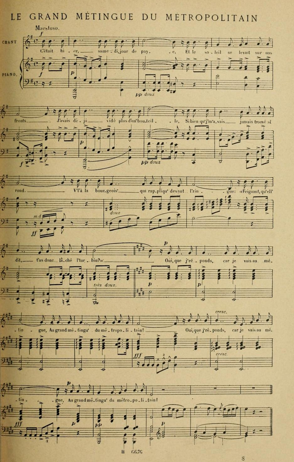 La partition du Grand métingue du Métropolitain.